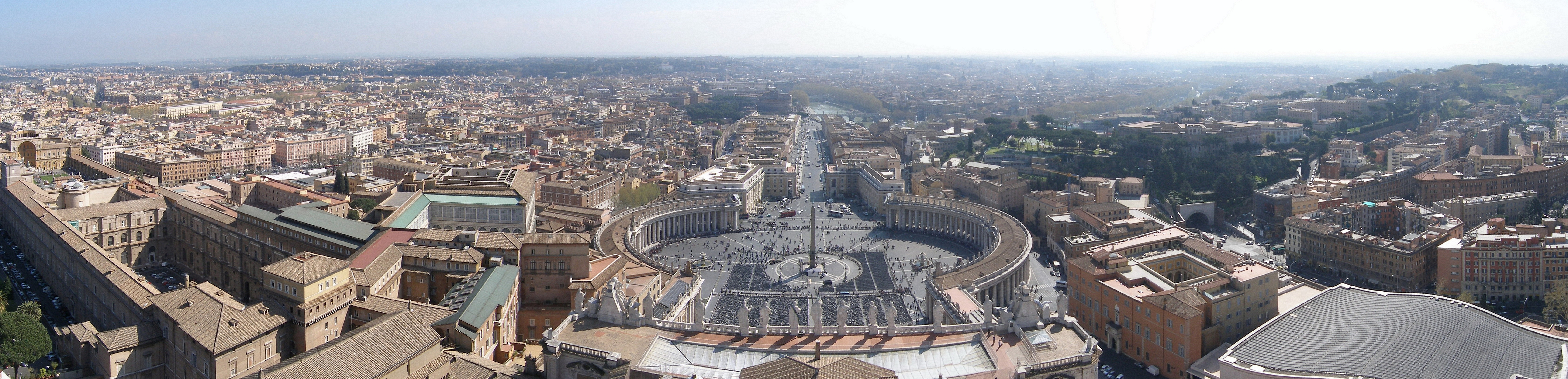 Rom, Vatikan, Petersplatz (von der Kuppel des Petersdomes aus gesehen); Panorama, zusammengesetzt aus 8 Einzelbildern